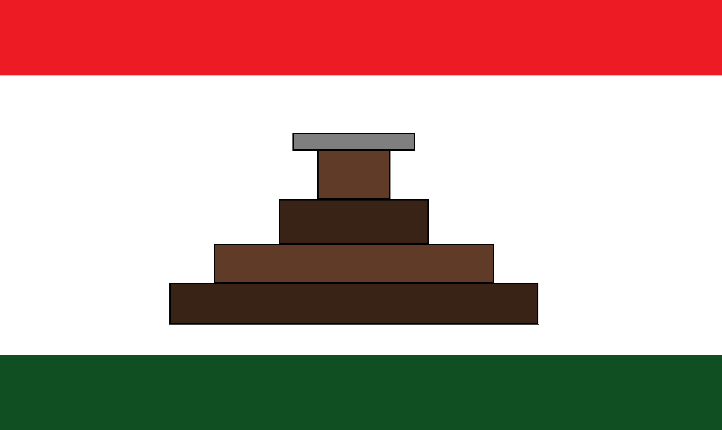 Bandera propuesta para la Ciudad de Comalcalco y sus aglomeraciones estatales